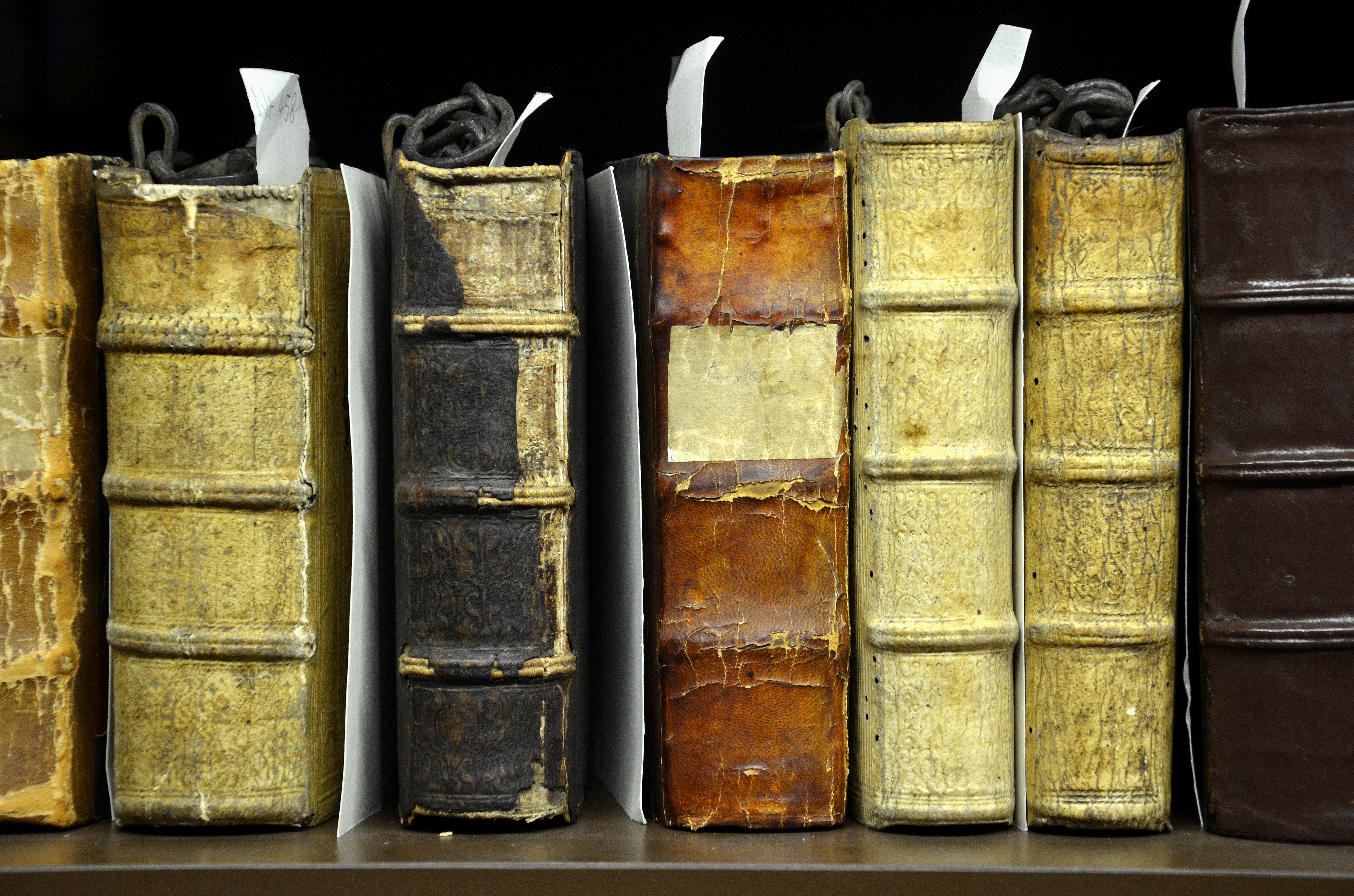 Die Ratsbibliothek der Stadt Hannover hat ihren Ursprung in einer Schenkung im Jahr 1440 durch Konrad von Sarstedt an den Rat der Stadt Hannover. Die durch weitere Schenkungen, Zustiftungen und durch Übernahme aus Nachlässen bis in 19. Jahrhundert angewachsene Sammlung, darunter auch die Buchbestände von 1476 des Volkmar von Anderten mit Handschriften und Inkunabeln. Die wertvollen Bücher finden sich heute (Stand: 07/2015) großteils in einem klimatisierten und durch Glaswände eigens gesicherten Raum im Untergeschoss der Stadtbibliothek ...